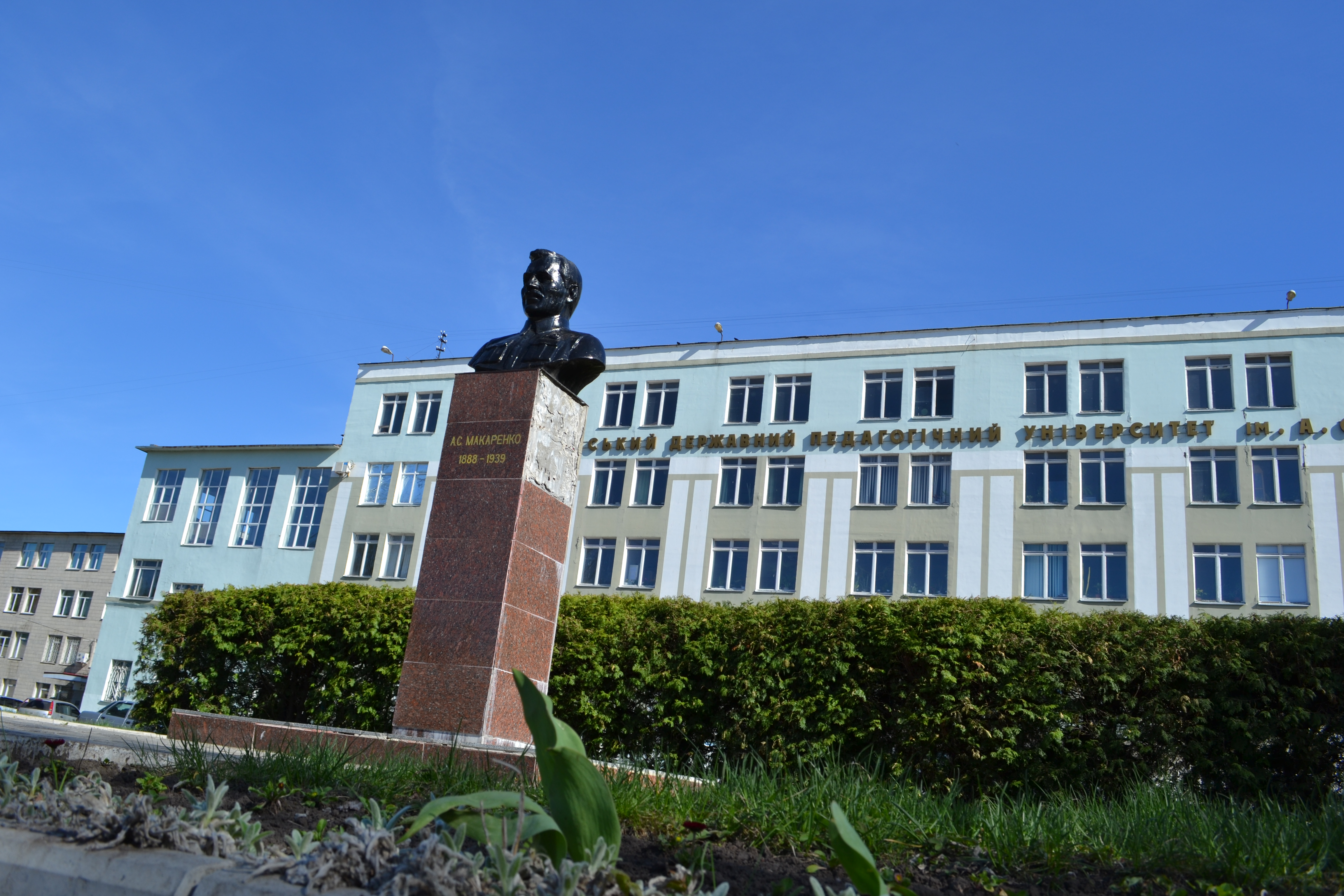 Пам'ятник українському радянському педагогу Макаренку Антону Семеновичу, Суми, вул. Роменська, 87